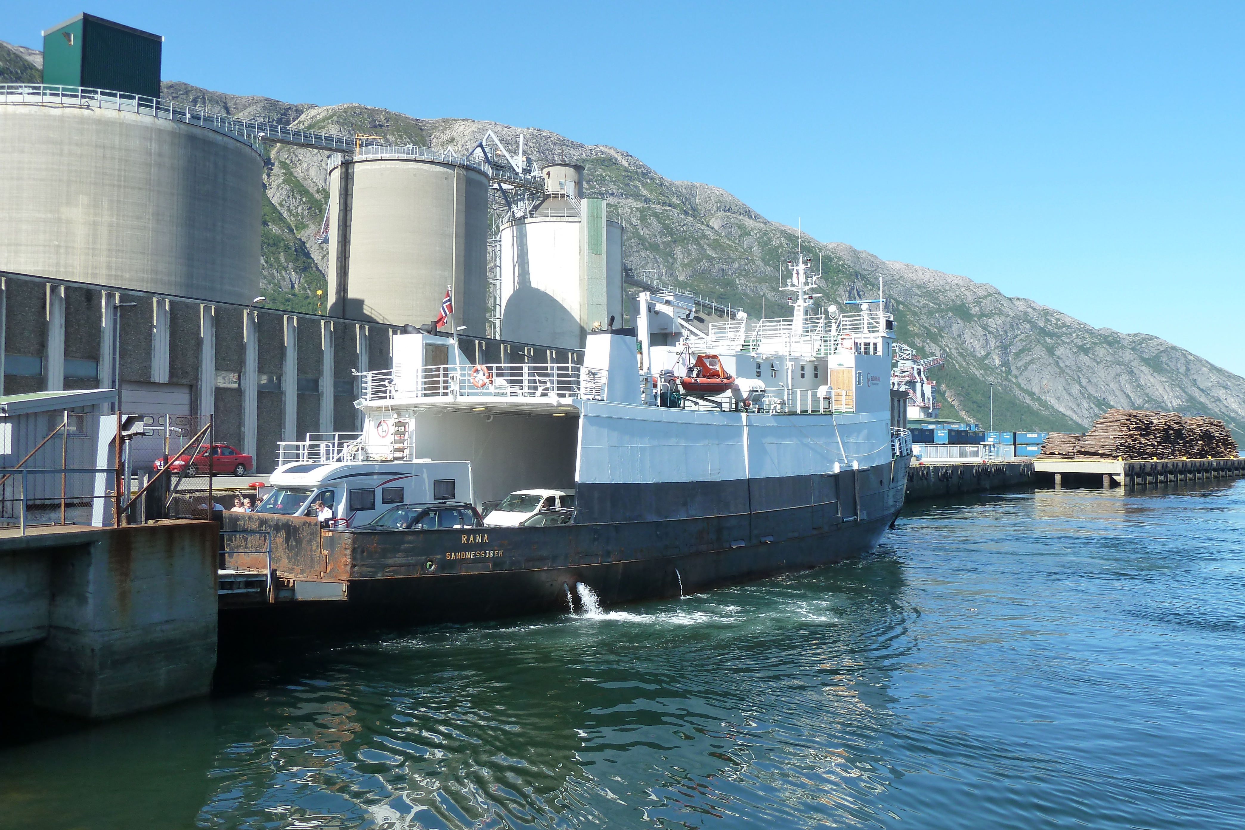 MS Rana legger til i Mosjøen fergekai.